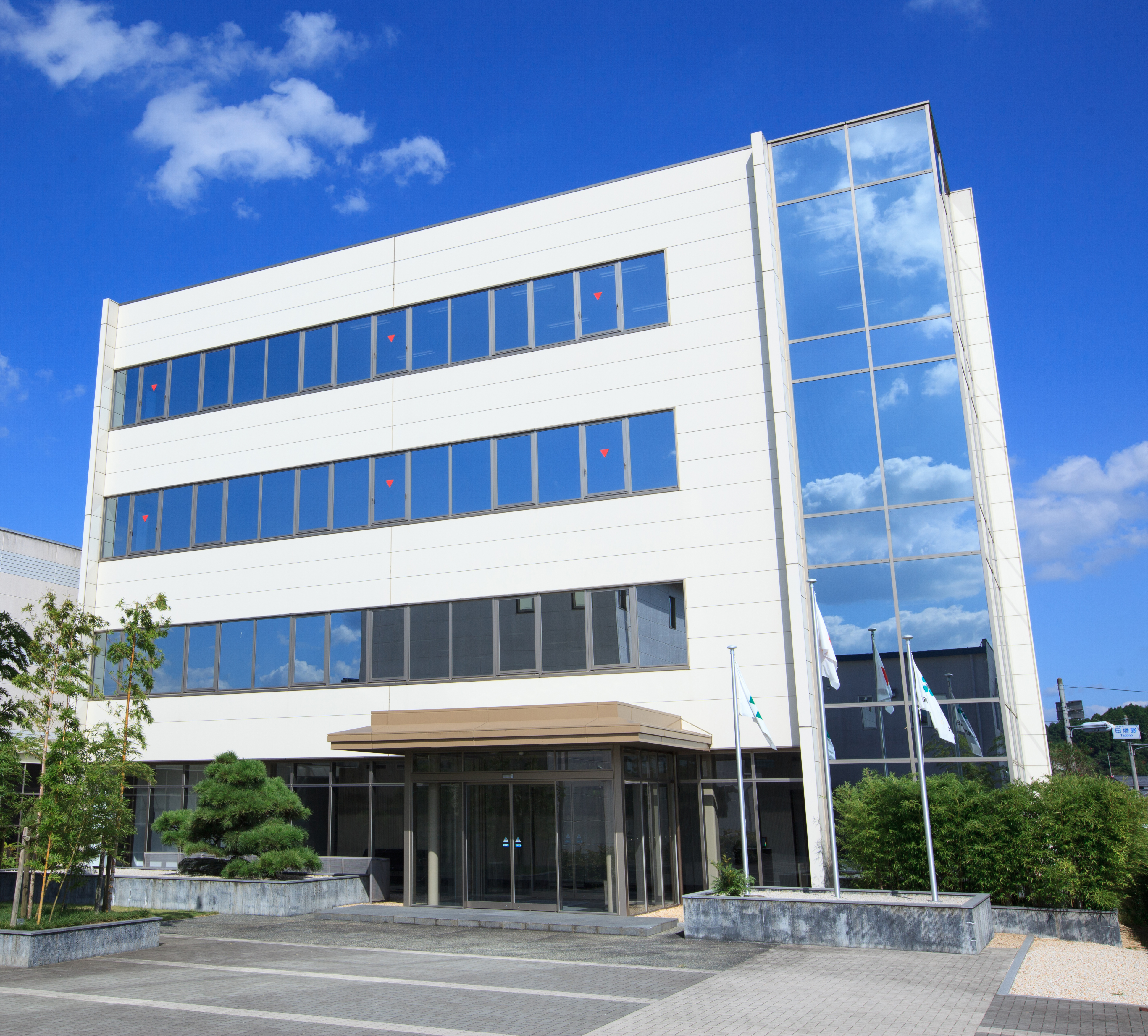 日新薬品工業株式会社 本社